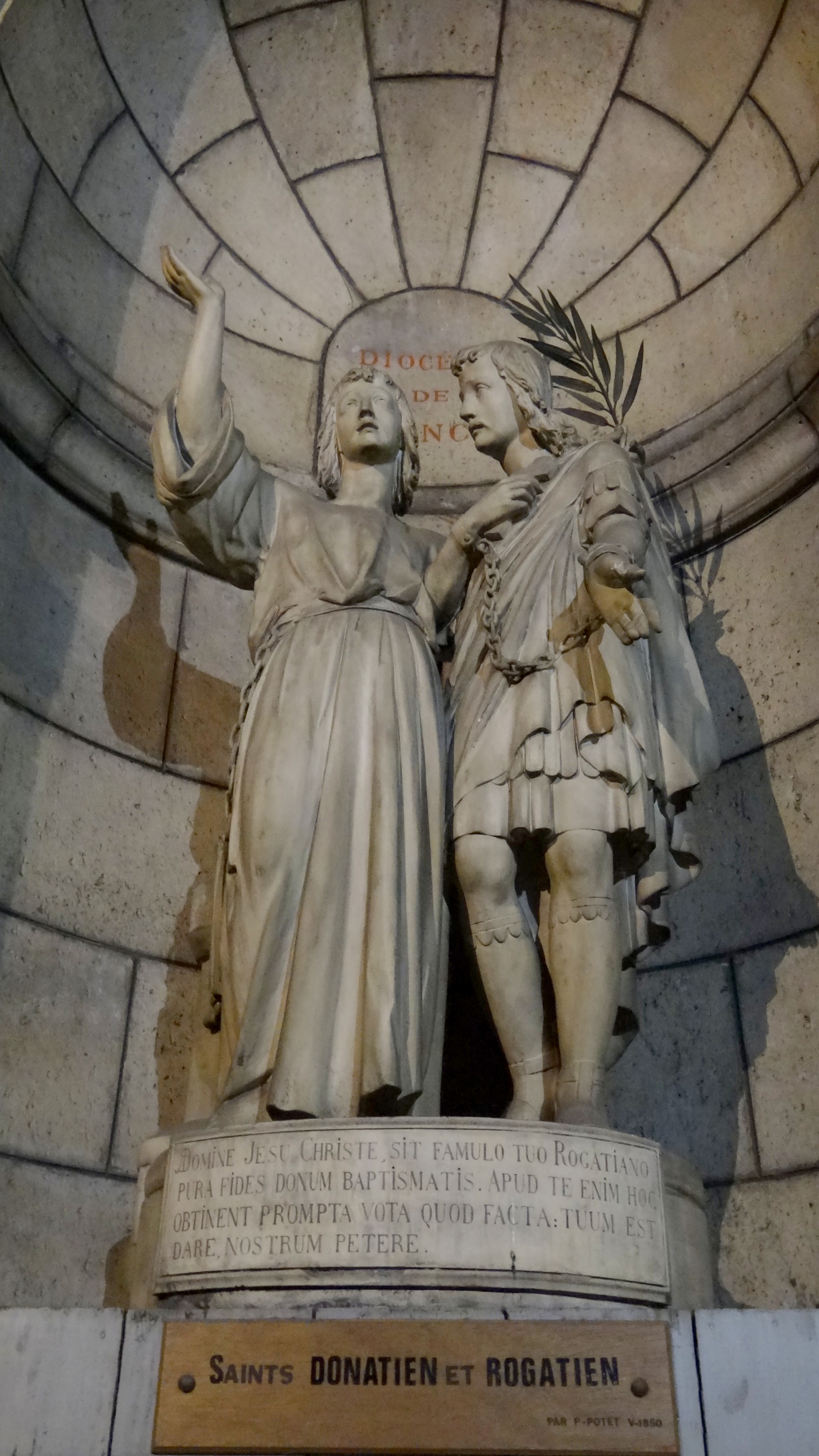 Saints Donatien et Rogatien par P. Potet (1850) en la crypte de la Basilique du Sacré-Cœur de Montmartre